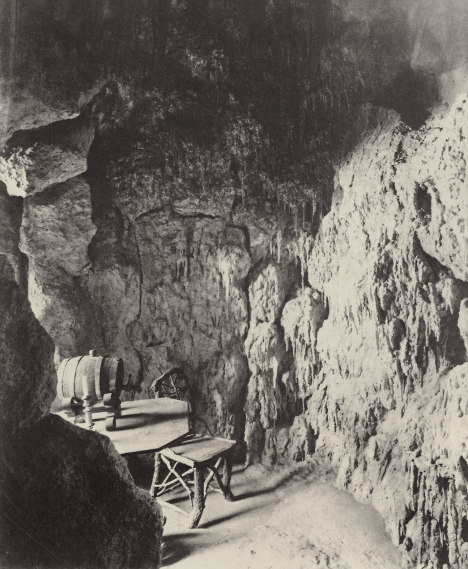 Bayerische Königsschlösser, Neuschwanstein – Tropfsteingrotte in der Wohnung des Königs